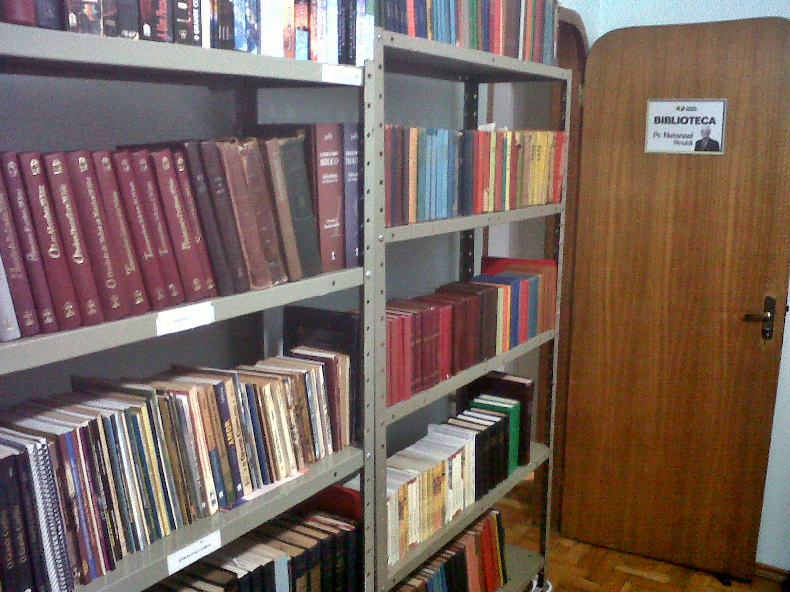 Parte da biblioteca do CACP, Centro Apologético Cristão de Pesquisas. Biblioteca Pr. Natanael Rinaldi.